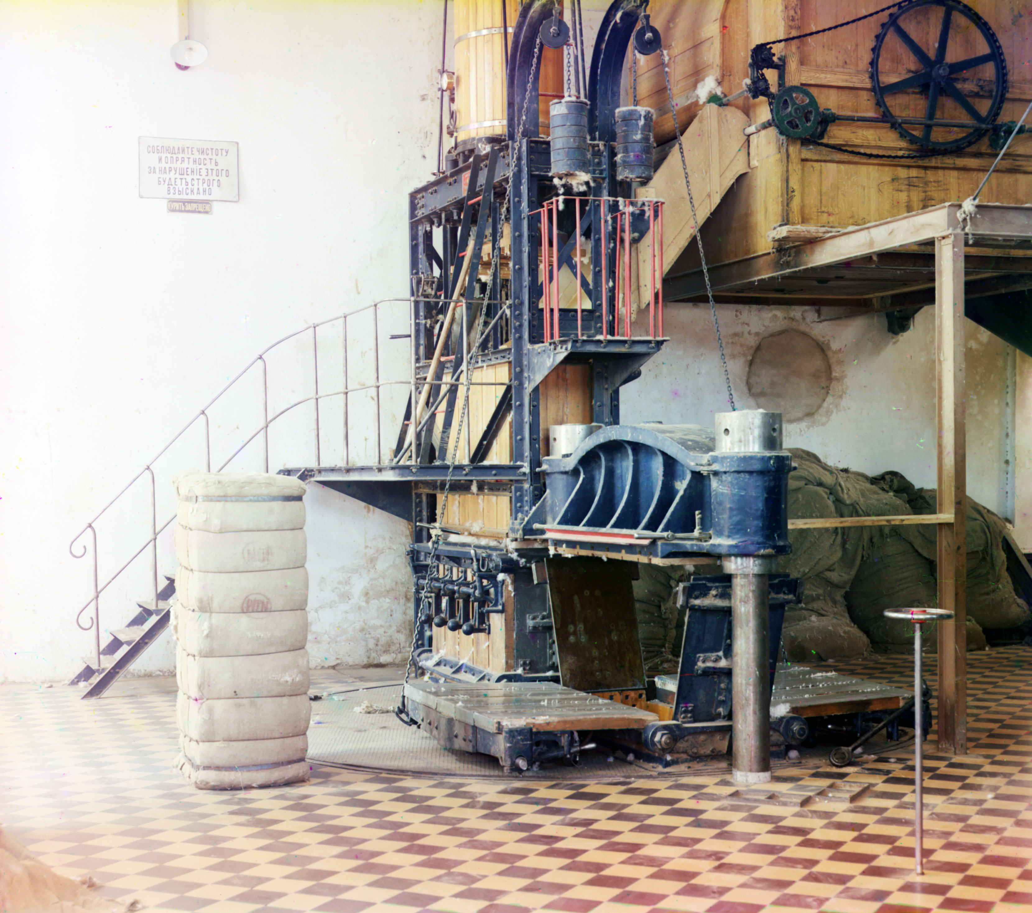 Прессовка готовых хлопковых кип. Мургабское имение.